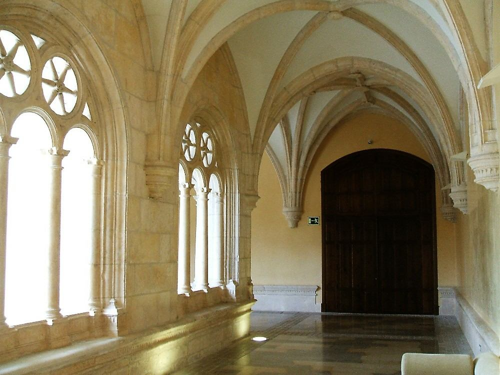 Claustro del antiguo Convento de La Merced, Burgos